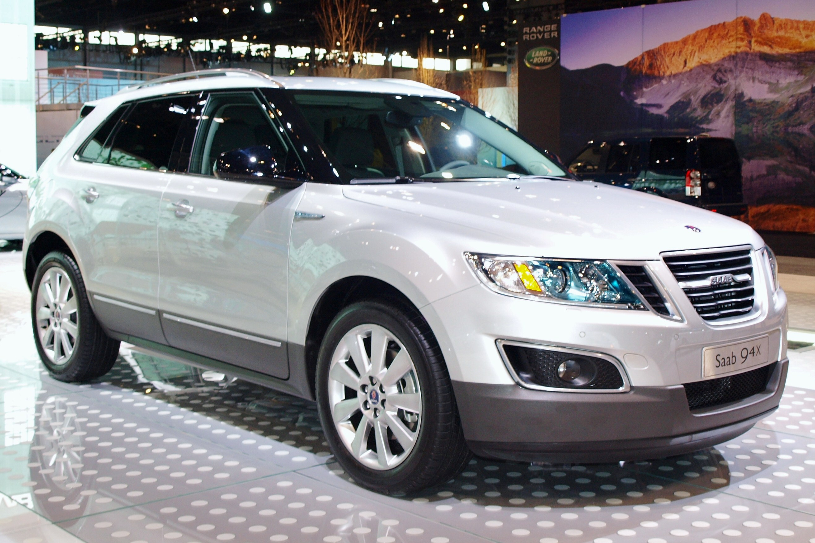 2011 Saab 9-4x